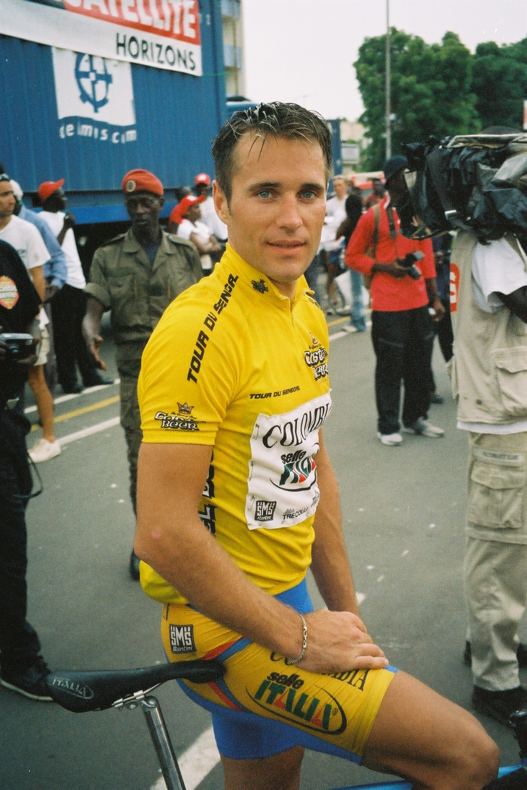 Andris Naudužs, vainqueur du Tour du Sénégal 2002